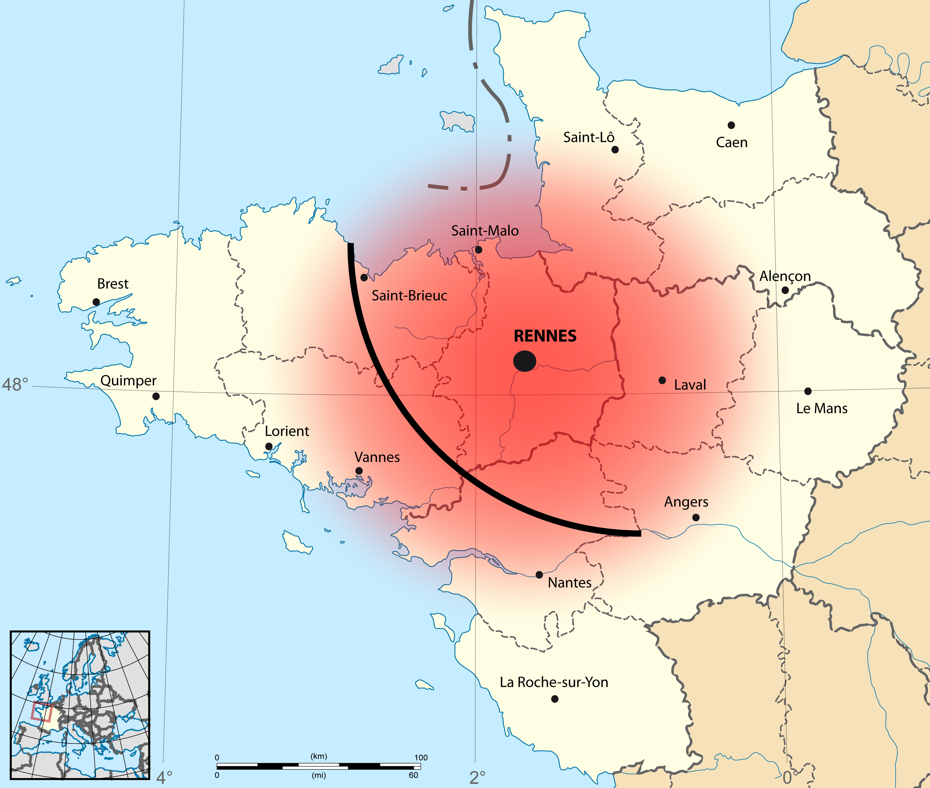 Cartographie présentant la zone de consommation de la galette-saucisse, en Haute-Bretagne. Le cercle rouge, d'un rayon de 150 kilomètres centré sur Rennes, est issu du livre Galette-saucisse je t'aime ! : le manuel officieux, de Benjamin Keltz, éditions Goater et du Coin de la rue, 2013 La ligne courbe, qui relie Saint-Brieuc et Ancenis en passant par Redon, est issue du livre Atlas de Bretagne / Atlas Breizh de Mikael Bodloré-Penlaez et Divi Kervella, éditions Coop Breizh, 2011.